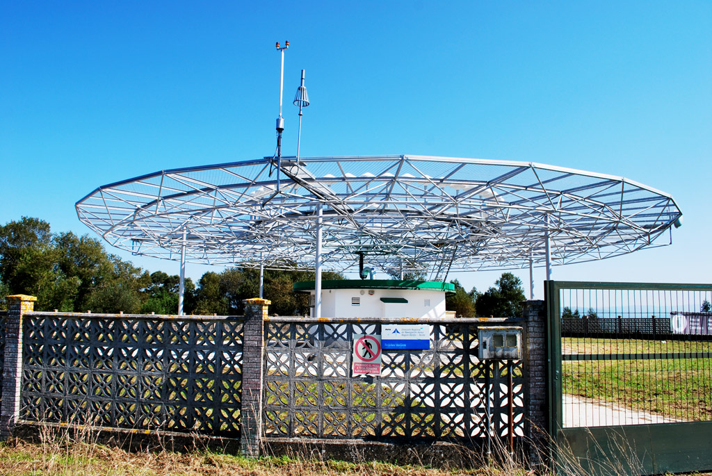 Radio baliza VOR/DME Lorbé, Oleiros